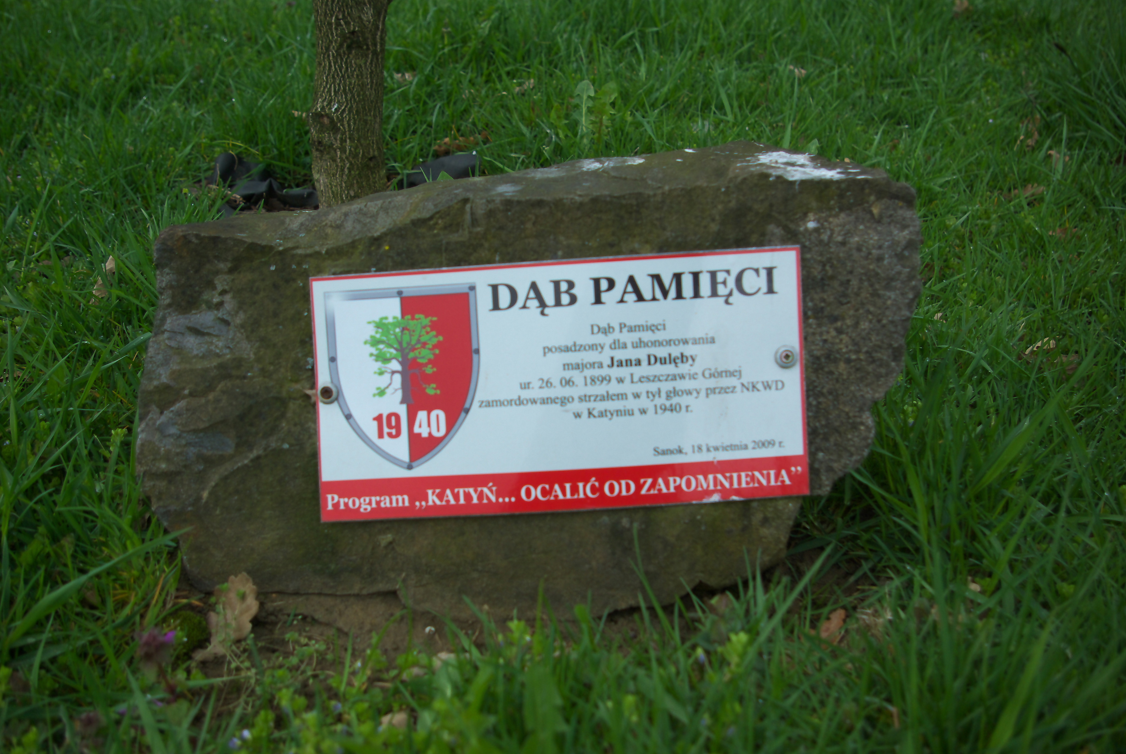 Kamień pamiątkowy przy Dębie Pamięci honorującym Jana Dulębę na Cmentarzu Centralnym w Sanoku